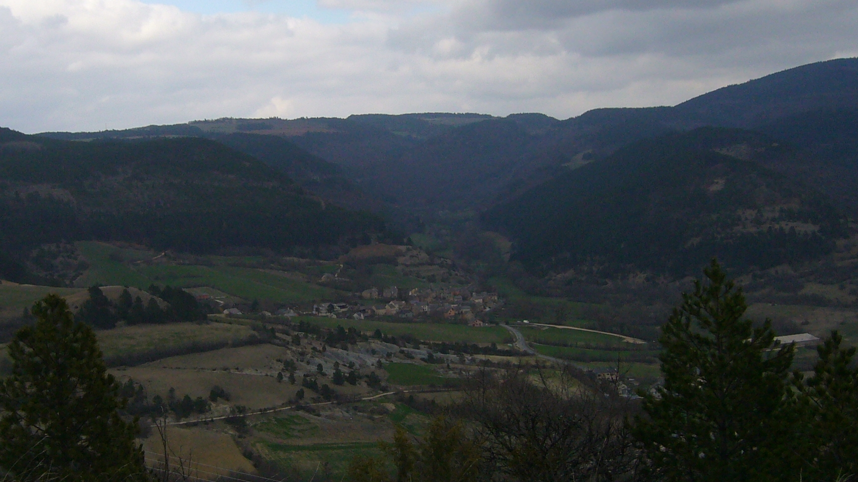 Vue générale du village de Lanuéjols, Lozère, France